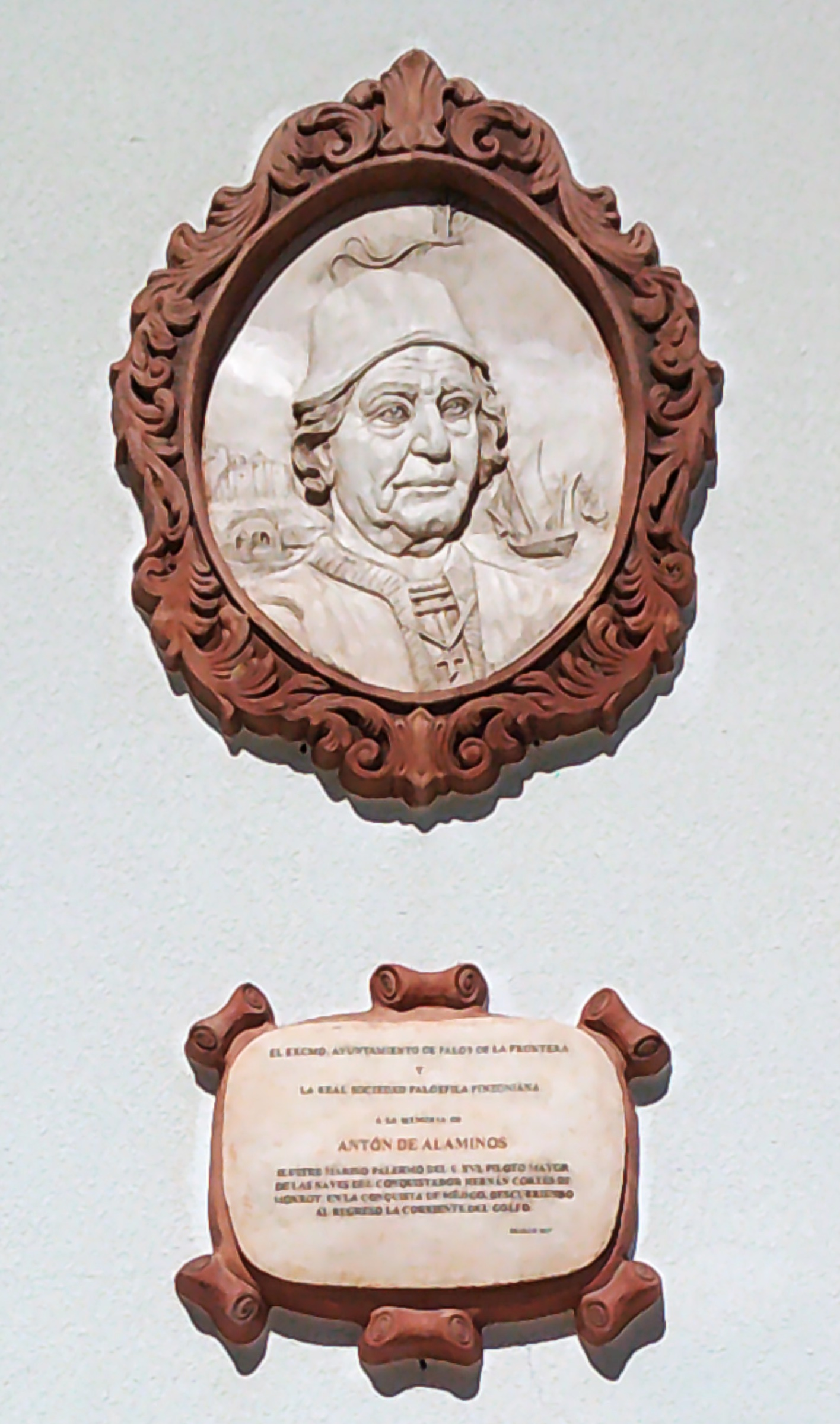 Antón de Alaminos. Plaza de España. Palos de la Frontera, provincia de Huelva, Andalucía, España.